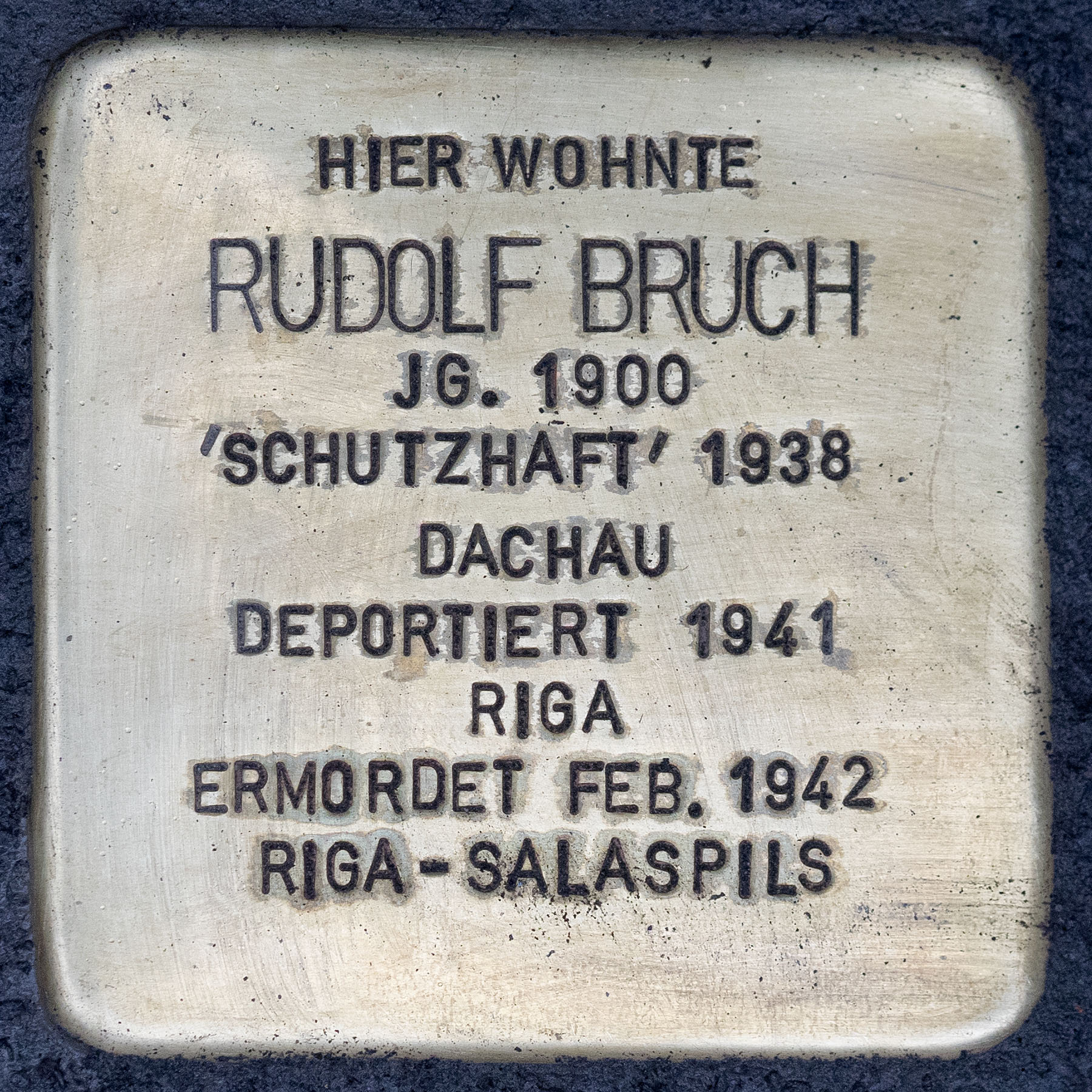 Stolpersteine Kempen: Rudolf Bruch